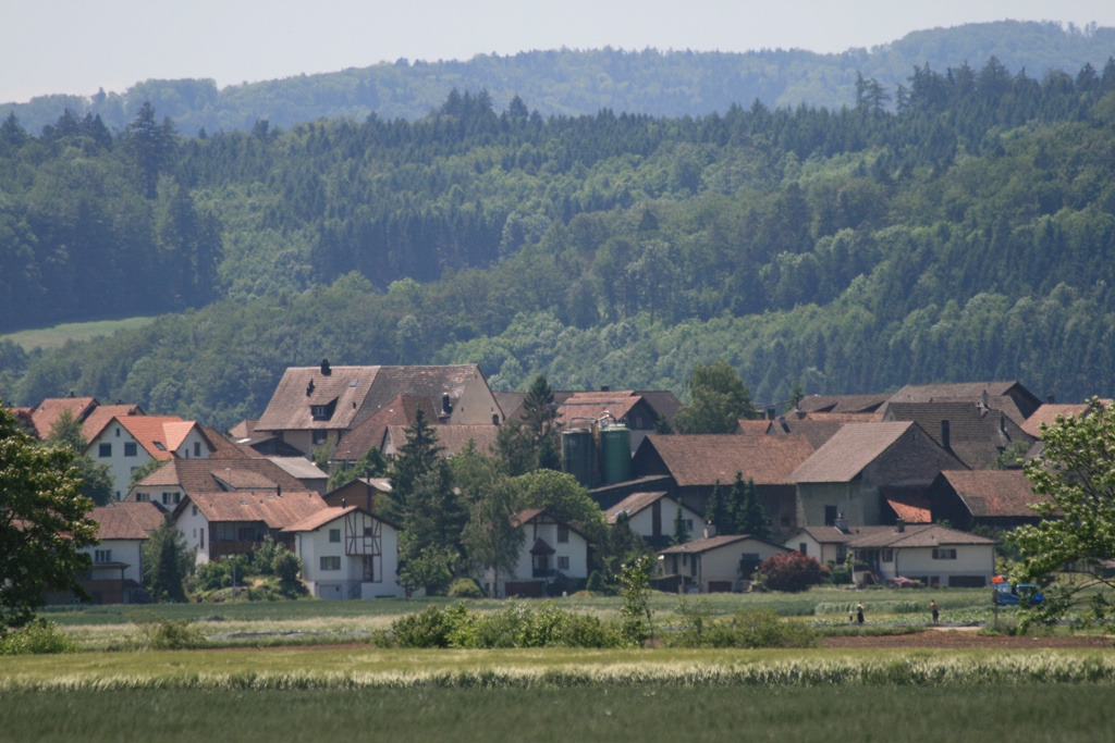 Gemeinde Rüfenach, Aargau